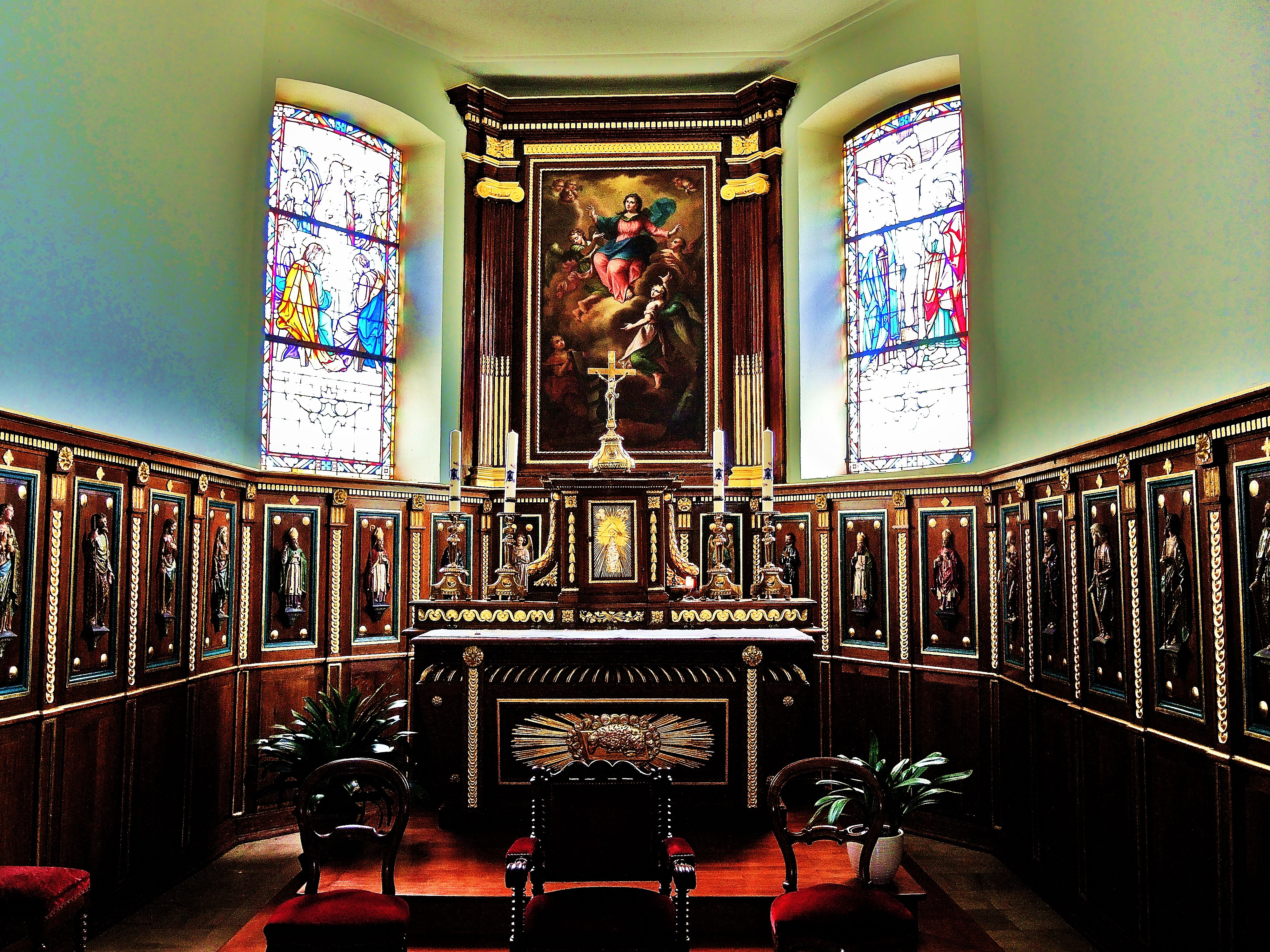 Nef de l'église Notre-Dame de Neunkirch.